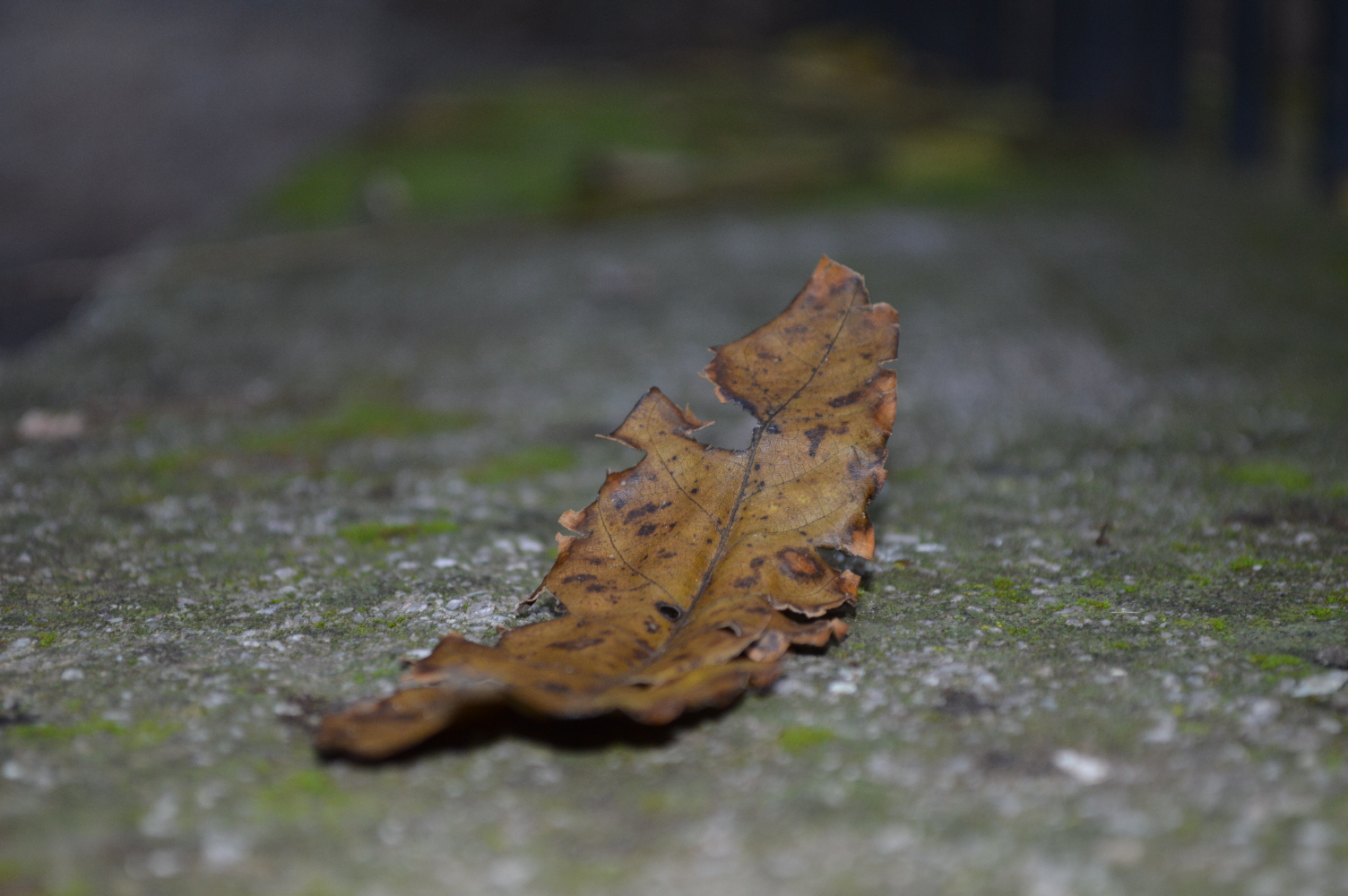 autumn in athens